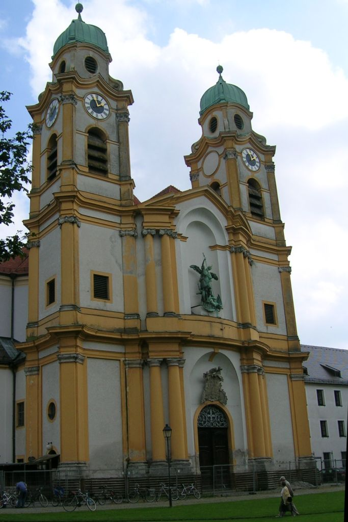 St. Michael in Berg am Laim (Munich, Bavaria)